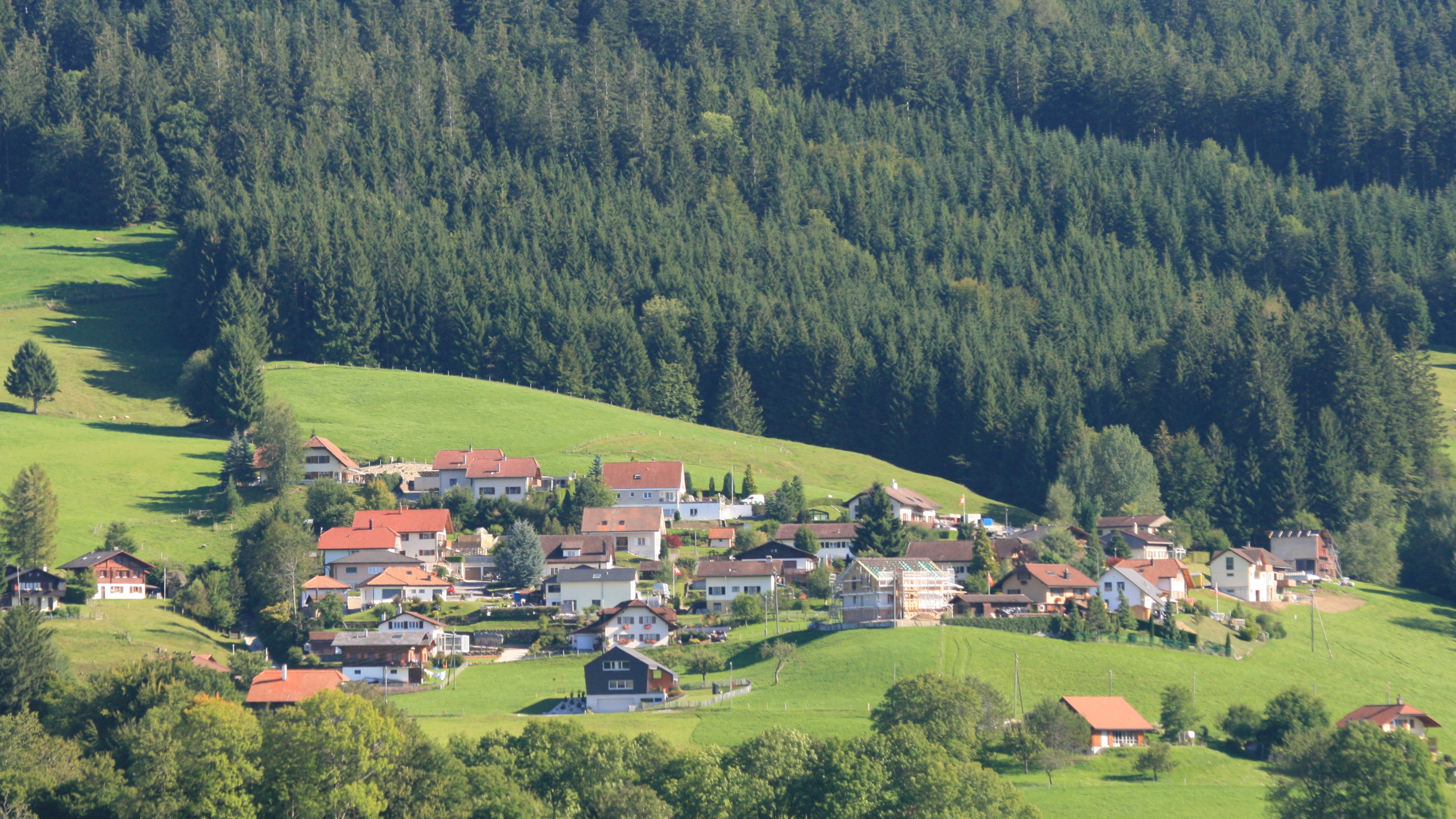 PLasselb, Kanton Freiburg, Schweiz